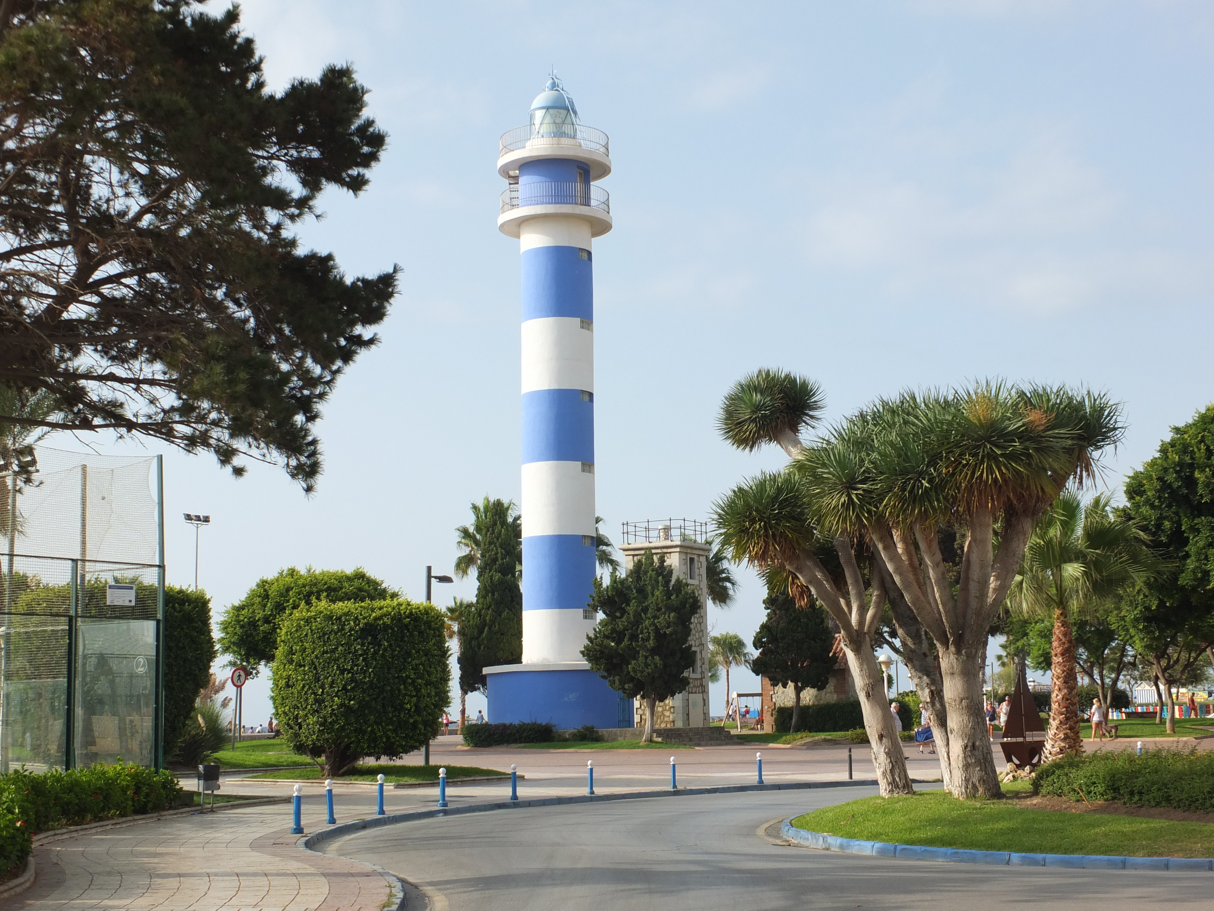 Leuchtturm von Torre del Mar, Spanien